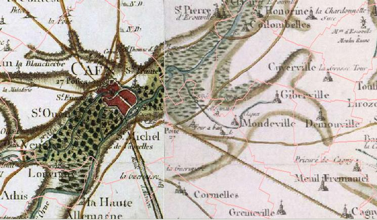 Plan Cassini, sud-est de Caen